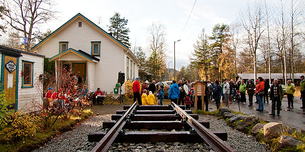 Fra åpningen av Prolog stasjon II, 2. oktober 2011, Høgtun, Olsborg, Målselv